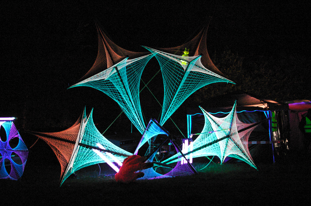 Outdoor-Party, typische Deko